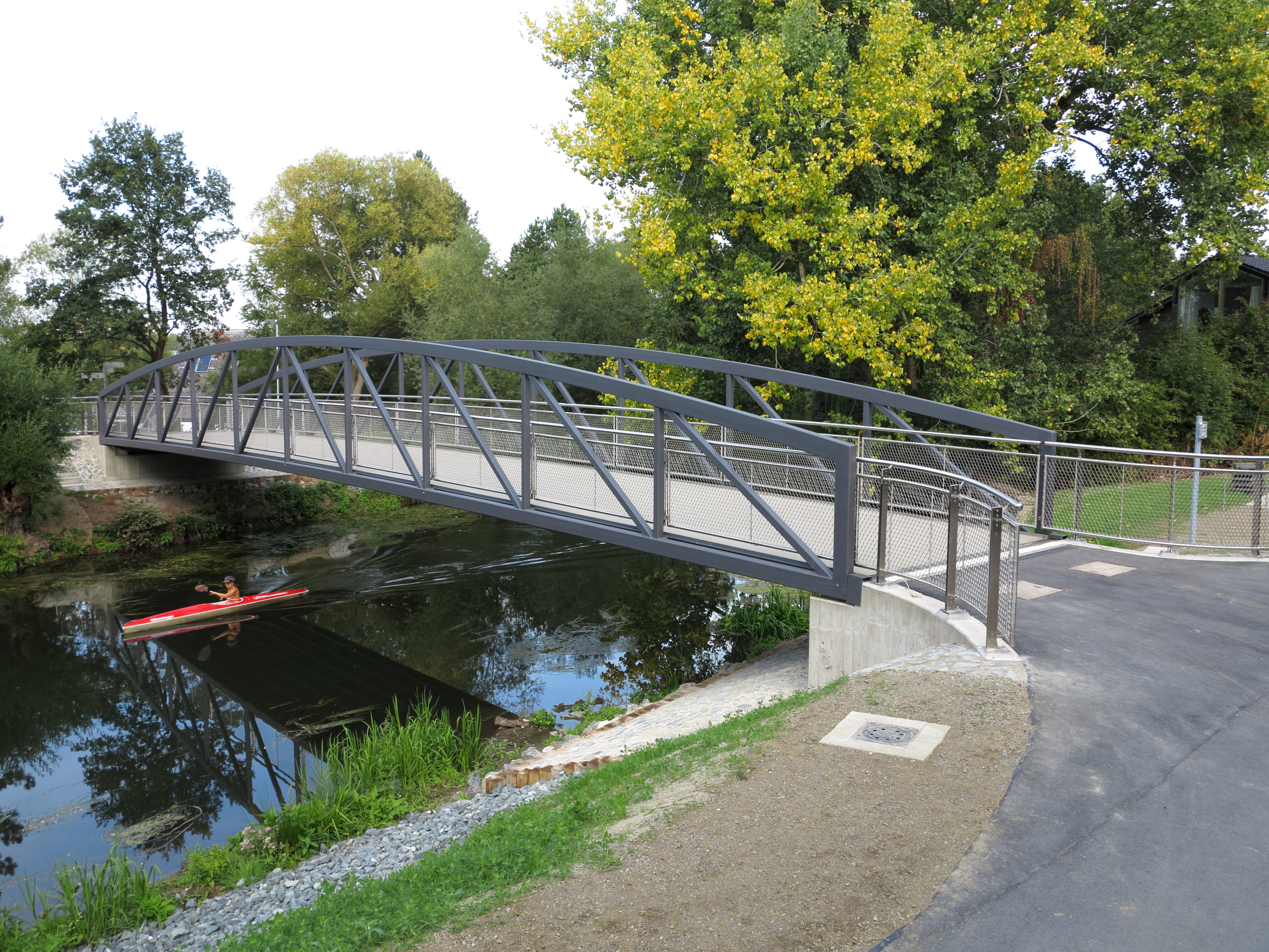 Braunschweig: die neue Okerbrücke Grund. Sie wurde am 10. September 2018 eröffnet und verbindet Melverode mit dem Südsee.